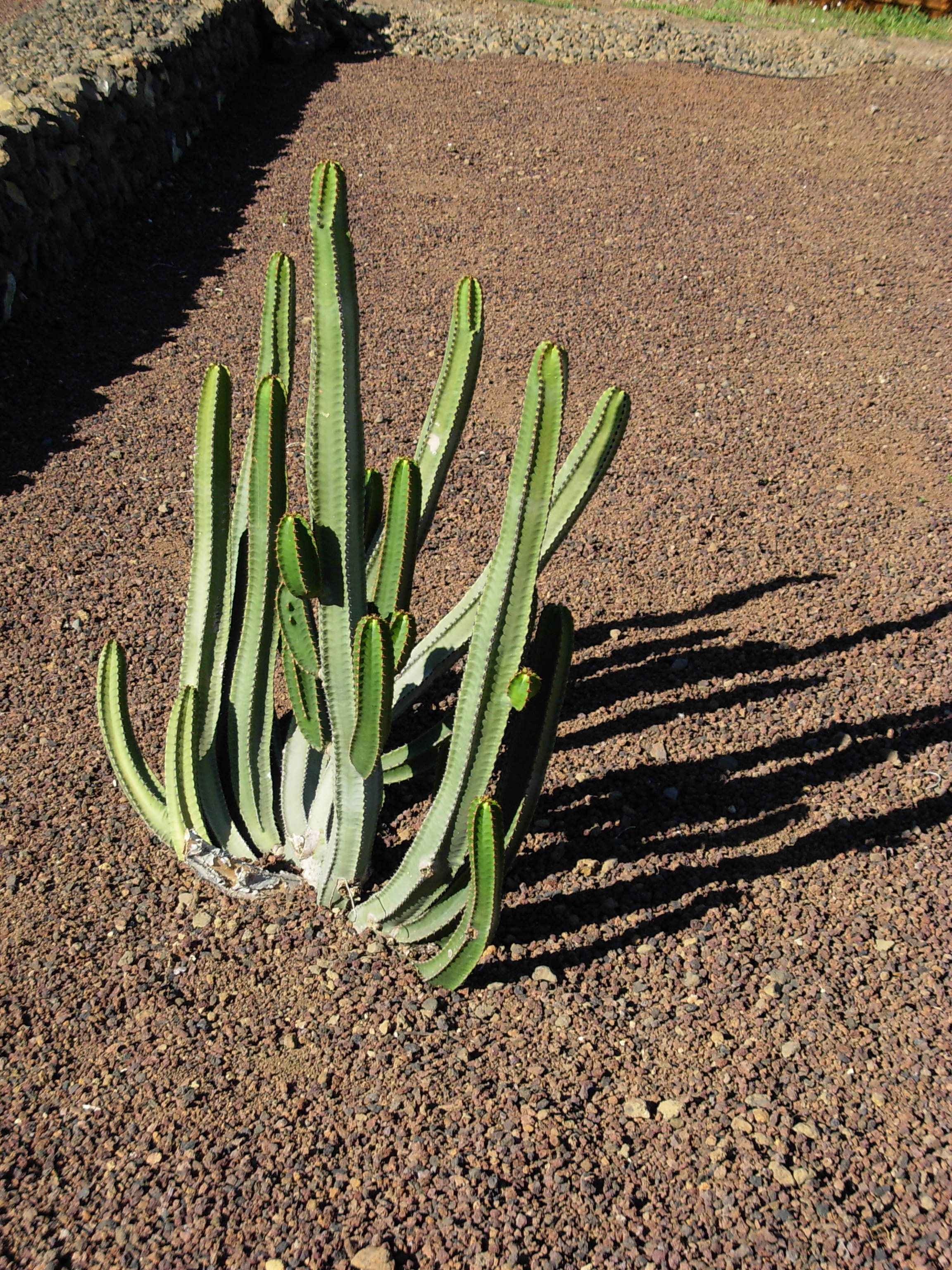 Euphorbia. Güímar